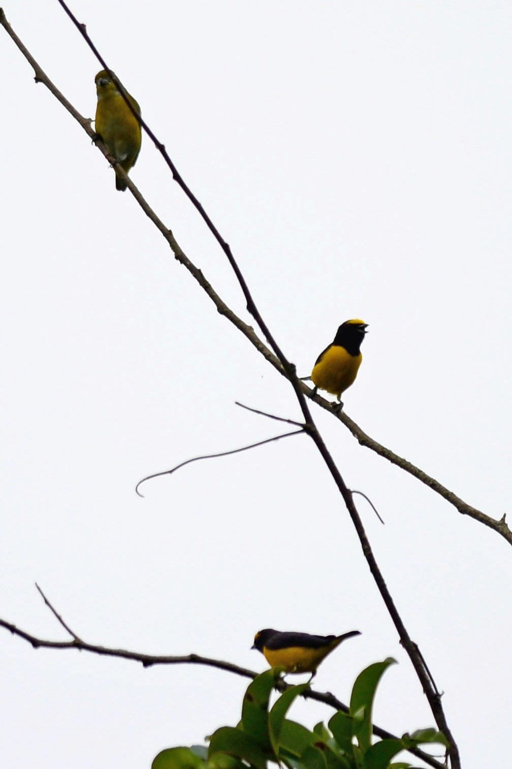 Campeche, México